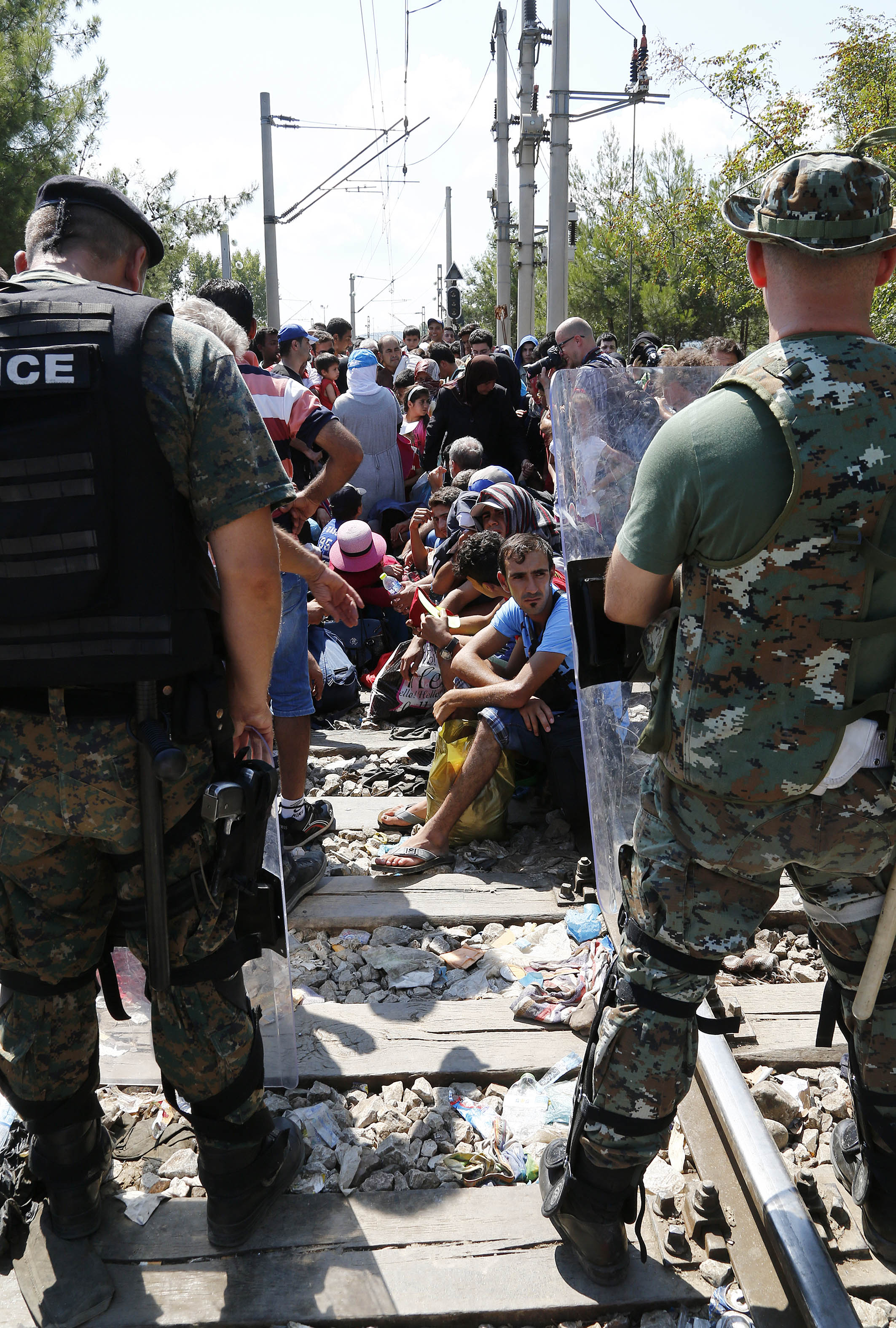 Arbeitsbesuch von Bundesminister Sebastian Kurz in Mazedonien. Besuch der Flüchtlingsströme am Grenzübergang Gevgelija. Mazedonien, 24.08.2015, Foto: Dragan Tatic